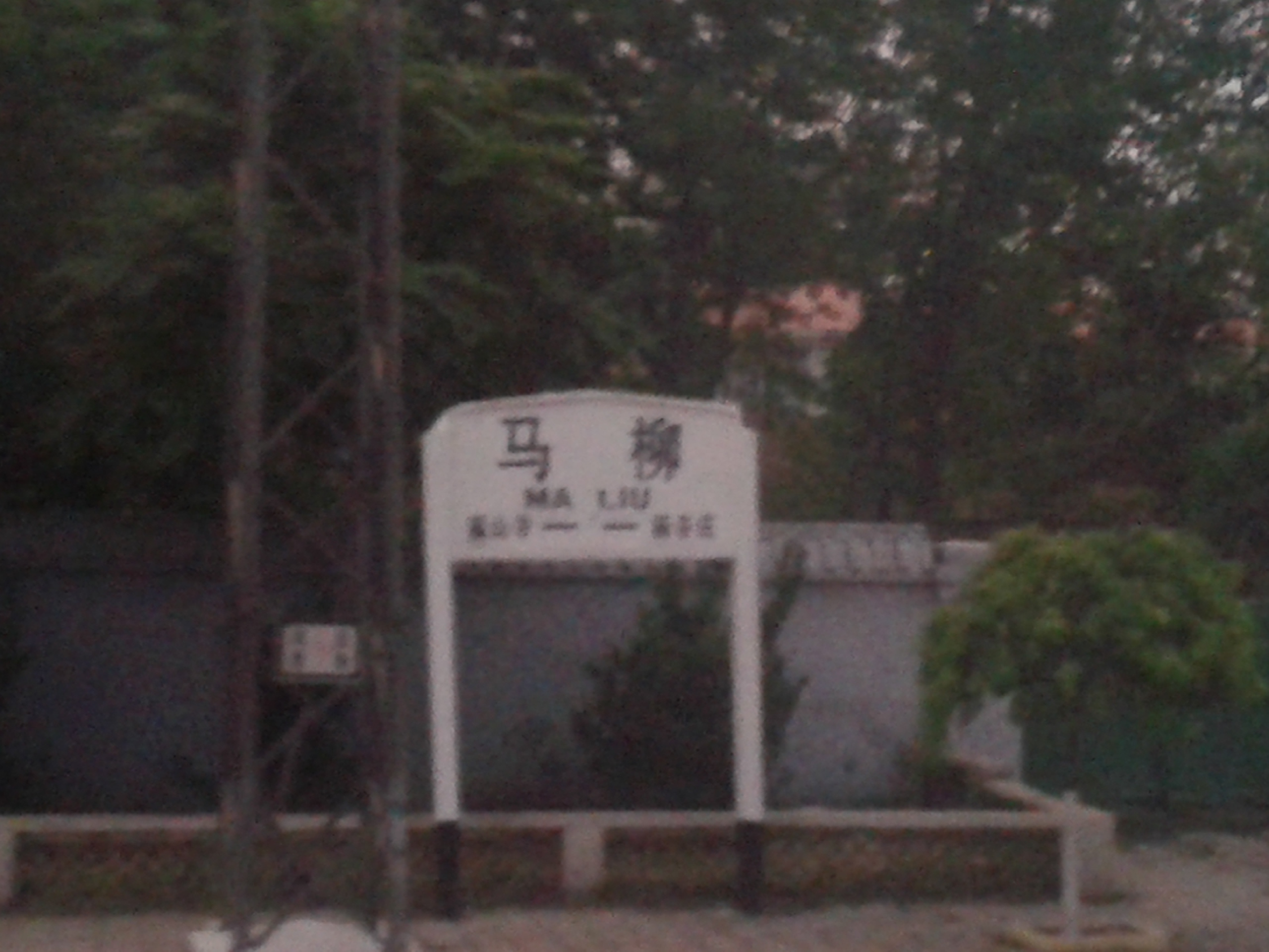 中文（中国大陆）: 马柳站站牌